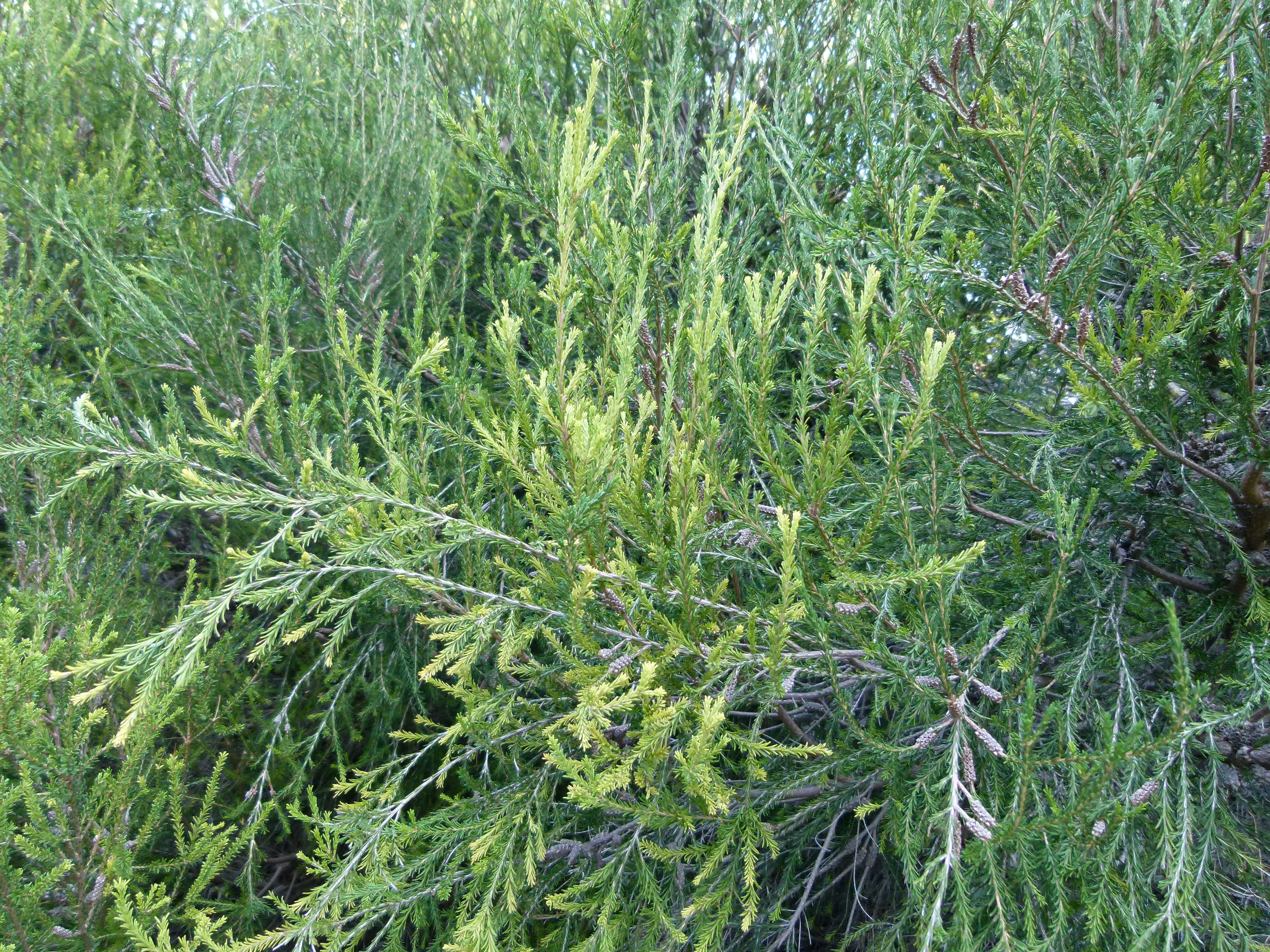 Melaleuca ericifolia - Swamp Paperbark. Jardin botanique Montjuic, Barcelone.